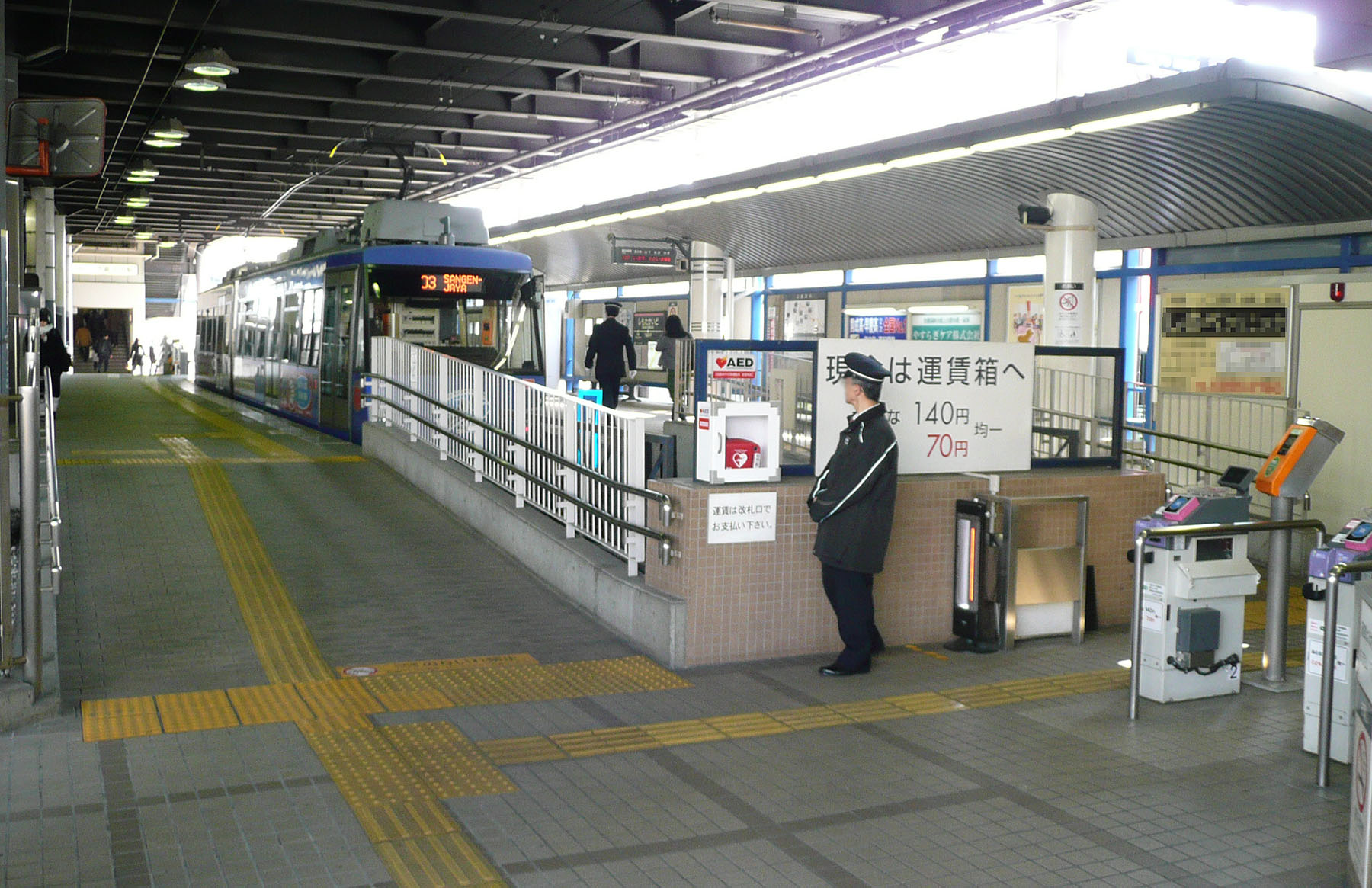 東急世田谷線下高井戸駅 改札口と降車ホーム